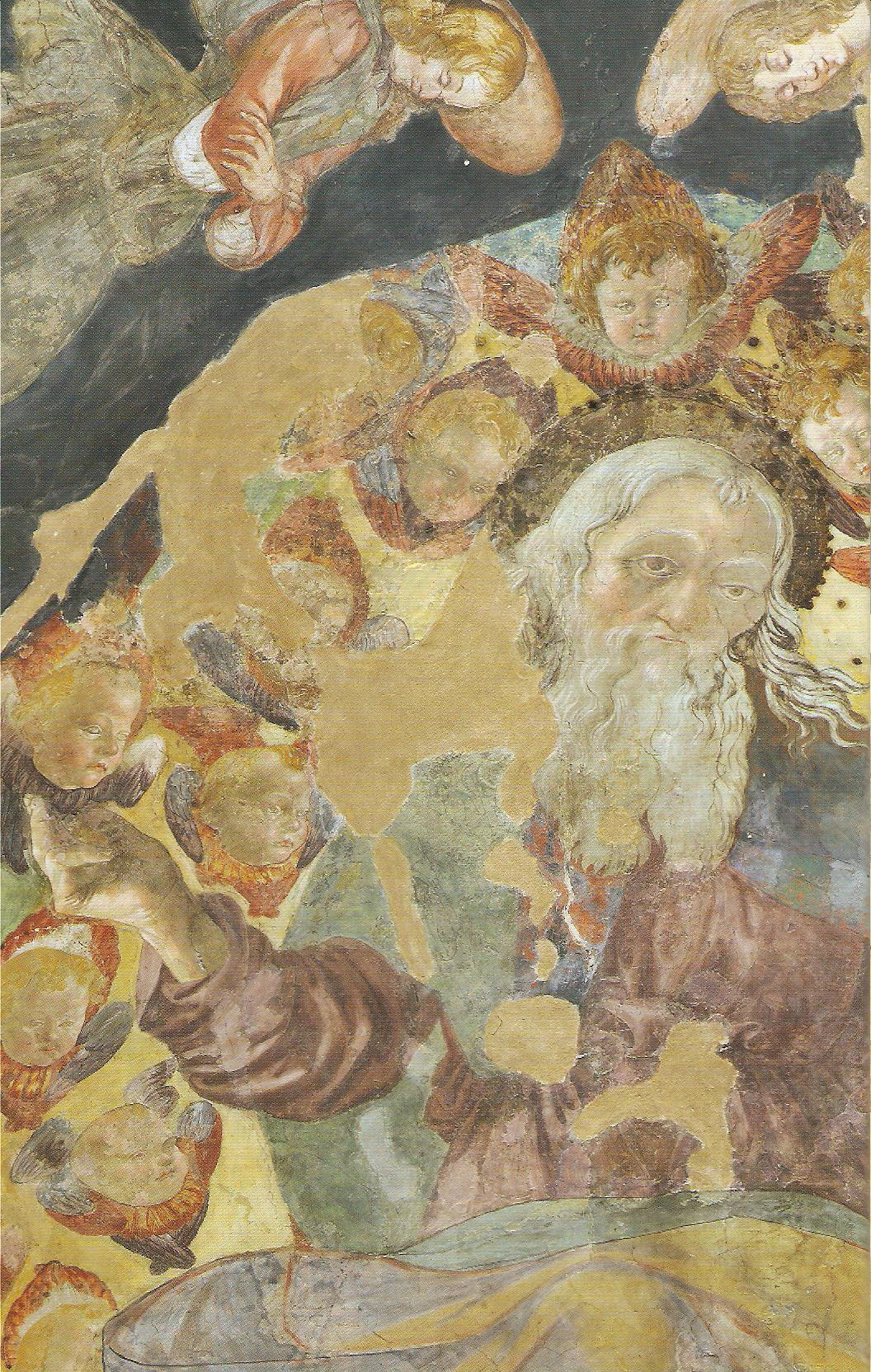 detail